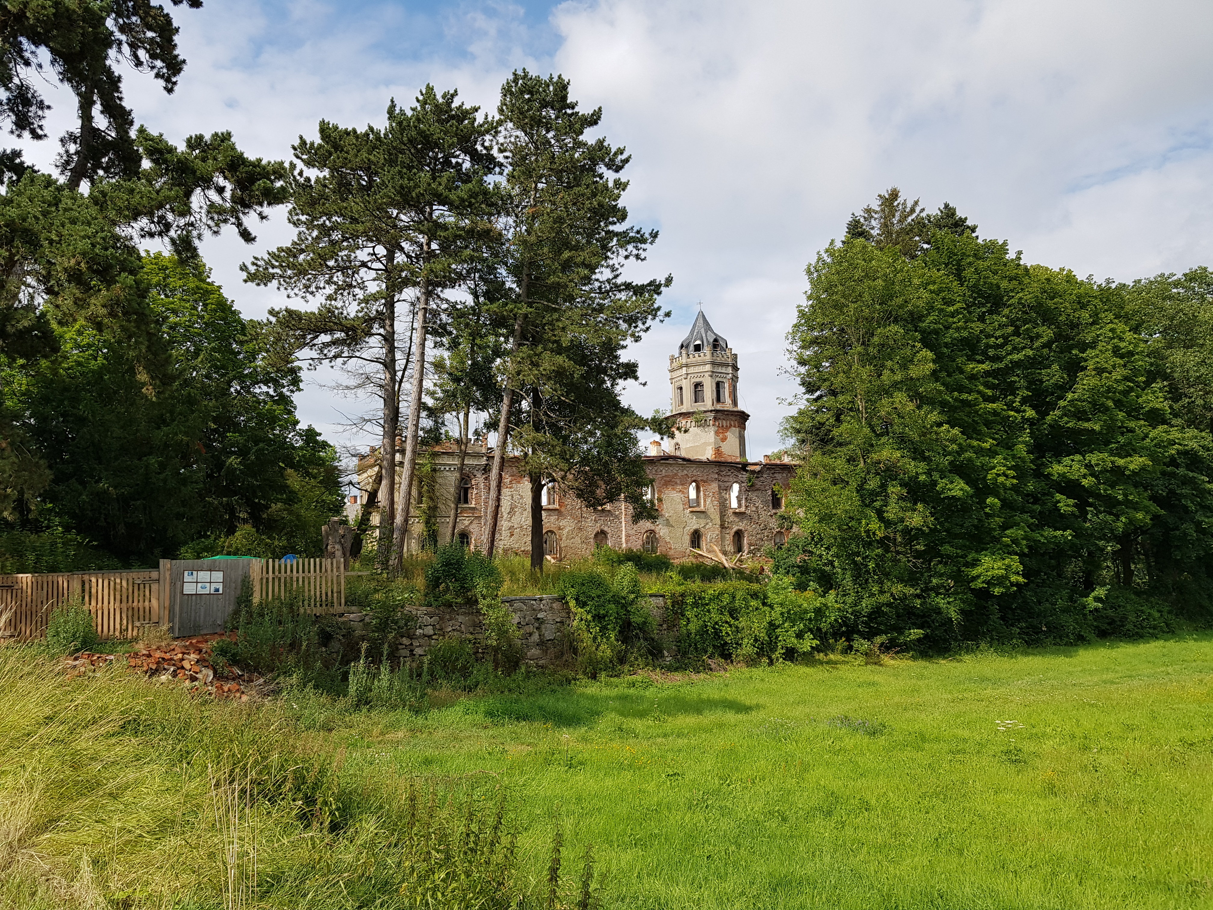 Zámek Veselí na Klatovsku